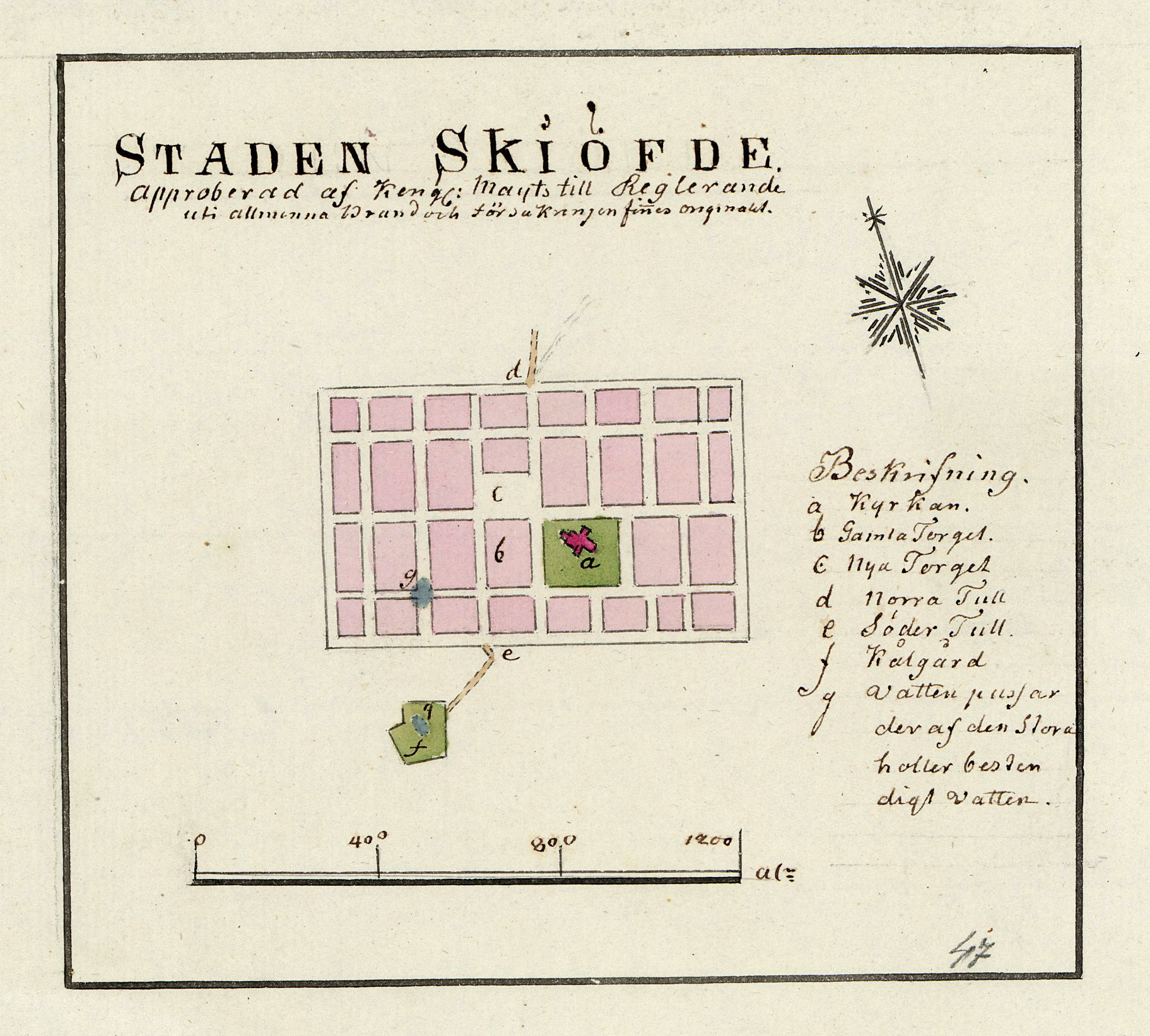 Karta över Skövde från ca: år 1800 av Fredrik Adolf Wiblingen.